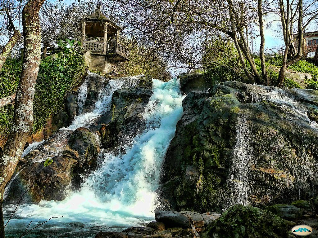 Redondela, río Alvedosa